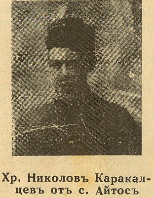 Христо Каракалцев.